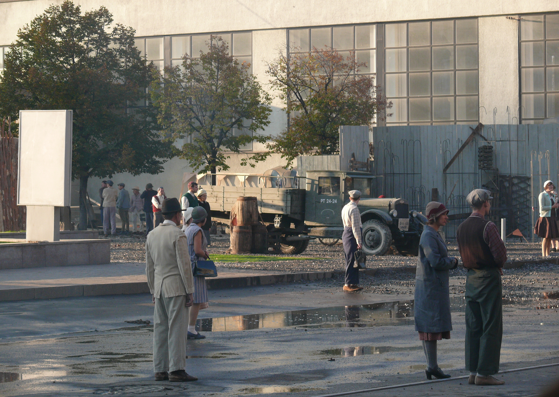 Съёмки фильма «Дау» на Привокзальной площади в Харькове.